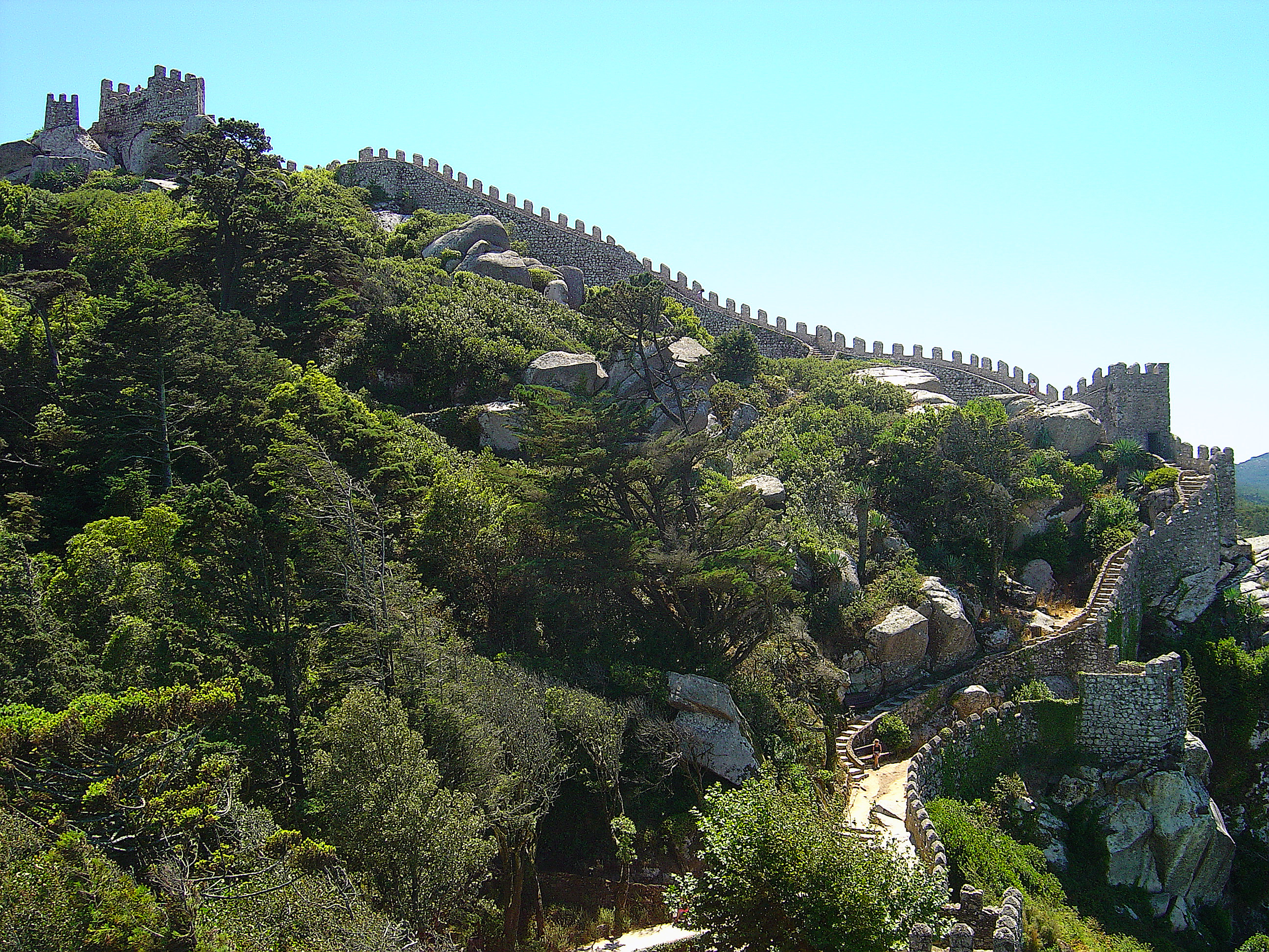 Construído pelos mouros no século VIII ou IX D.C., este Castelo está implantado em dois cumes da Serra, de onde se disfruta generoso panorama. Circundado de muralhas e diversas torres, sofreu diversas reparações em especial no período romântico (cerca de 1860), quando o rei consorte D. Fernando II de Saxe Coburgo-Gotha, o restaurou, arborizou os espaços envolventes e conferiu às velhas ruínas medievais uma outra dignidade. O Castelo foi conquistado por D. Afonso Henriques (1147), monarca a quem se deve a construção da Capela românica de S Pedro, cujos interessantes vestígios ainda sáo visíveis, junto ao «oppidum» onde há também uma cisterna, uma porta árabe «em ferra- dura» e diversas estruturas de habitação. Esta Capela preserva dois curiosos portais românicos e, na capela-mor, restos da pintura a «fresco» de sentido decorativo, bem como diversos túmulos da antiga necrópole medieval.